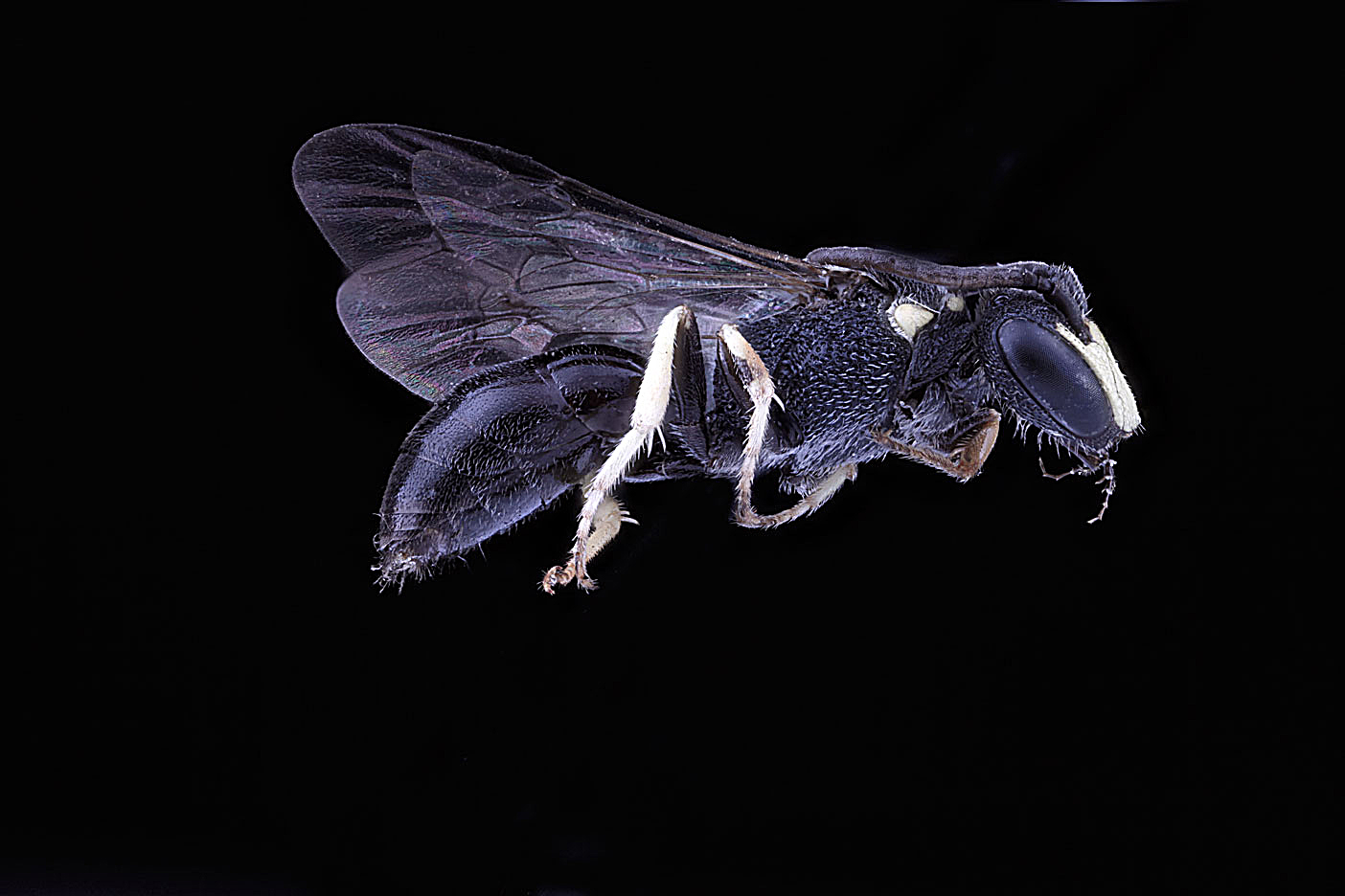 Hylaeus ornatus, male